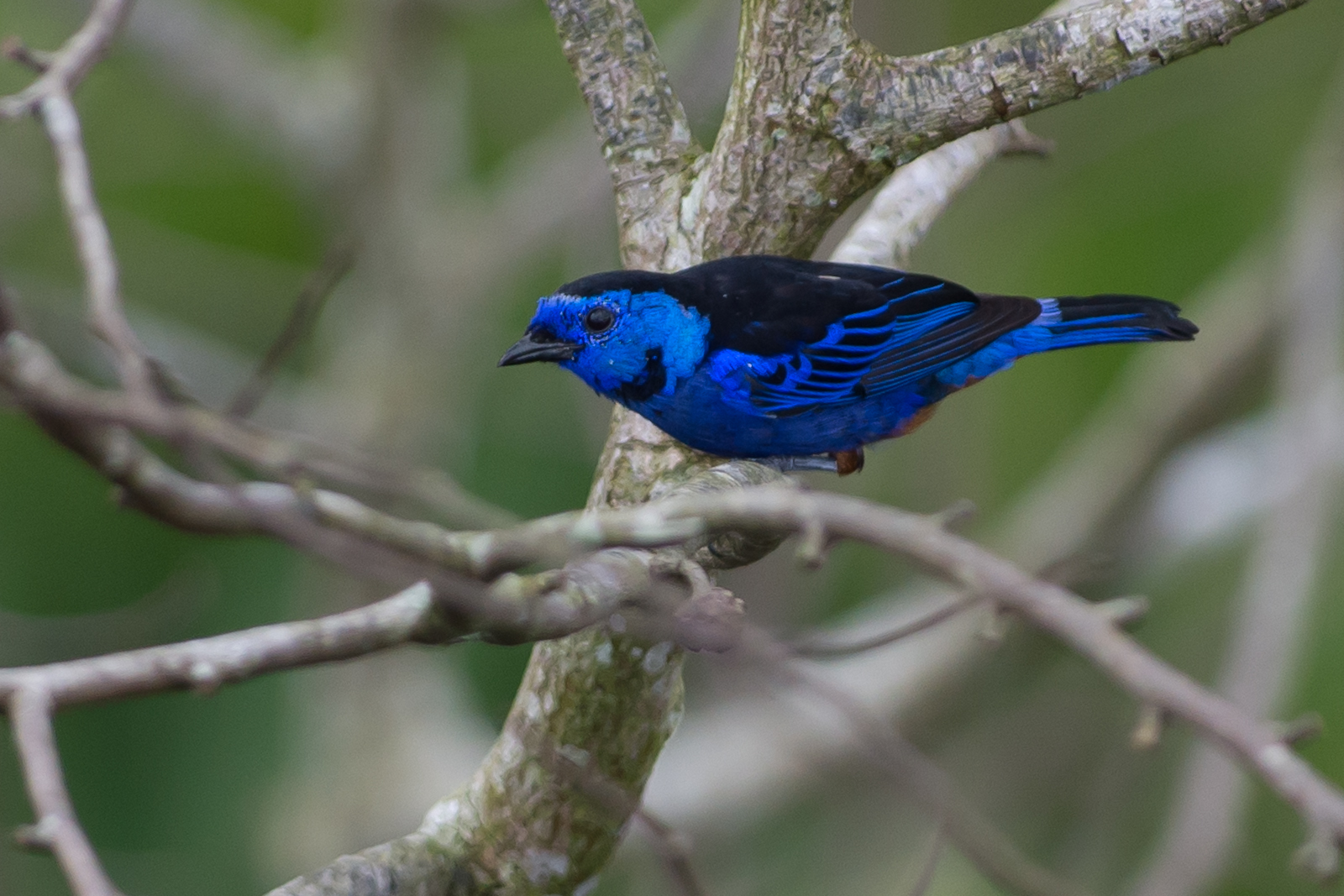 Tangara velia Opal-rumped Tanager